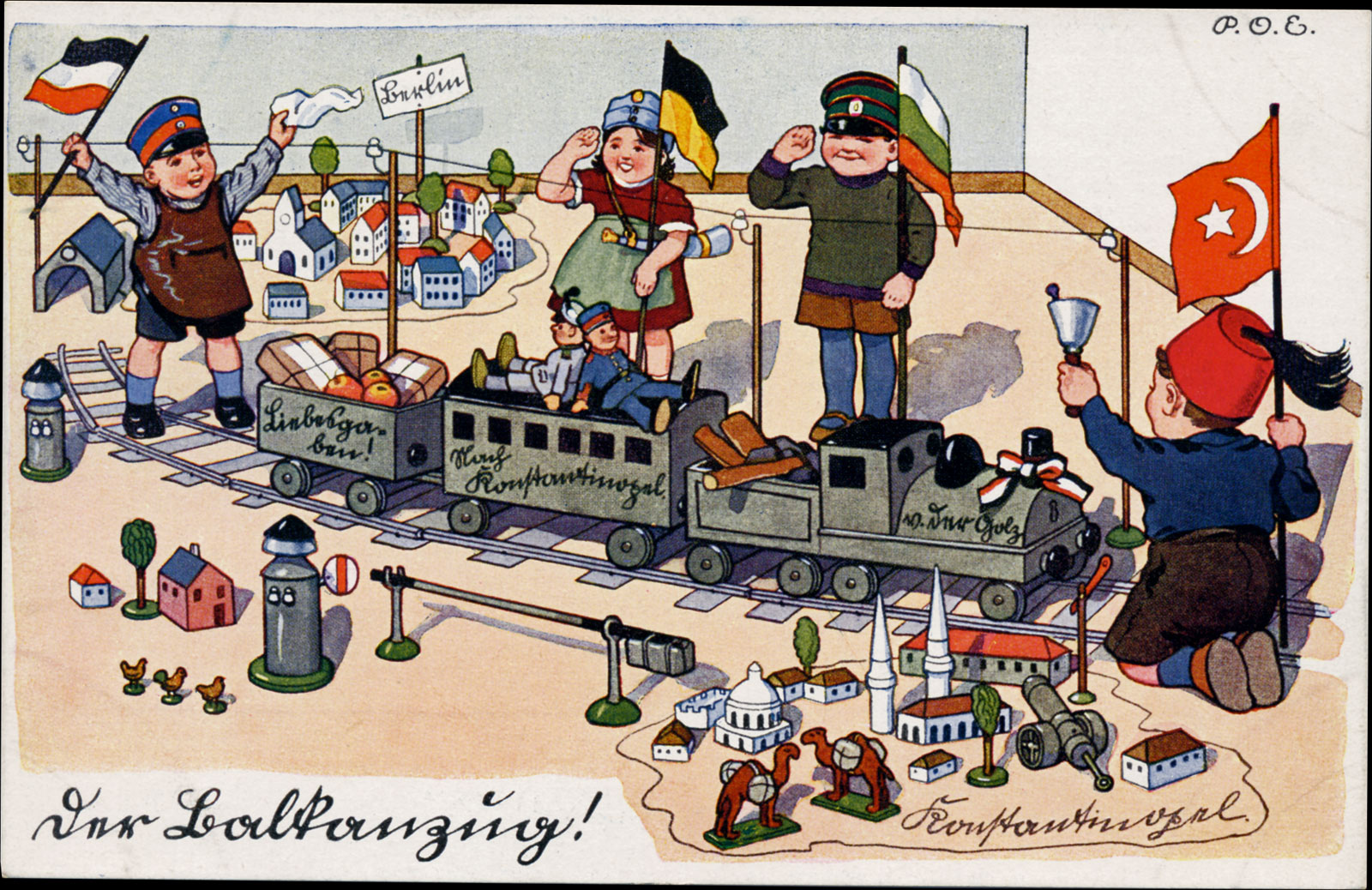 Propagandapostkarte zum Balkanzug (um 1916/17), die Verbindung zwischen den Mittelmächten symbolisierend